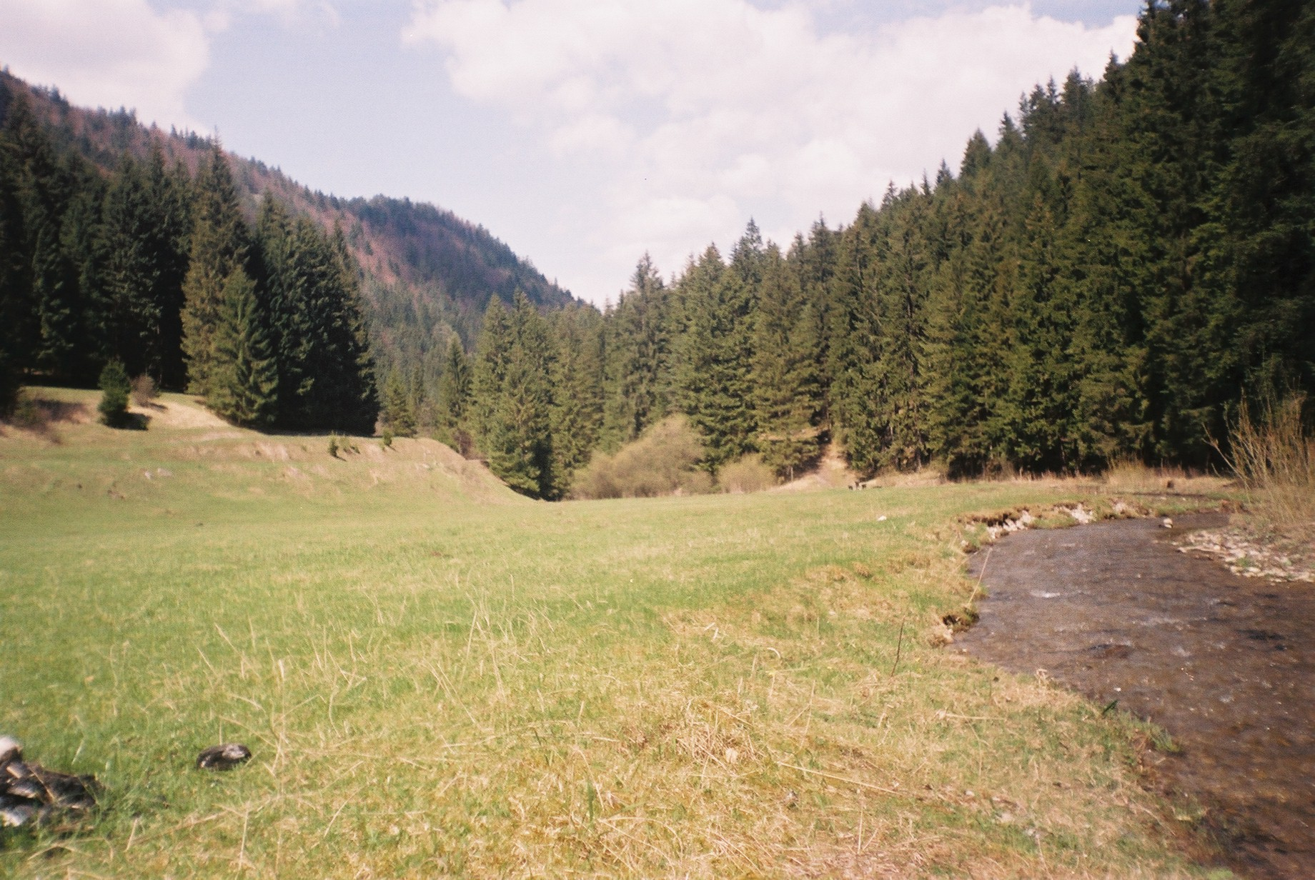 The valley of Ludrová (Ludrovská Dolina)